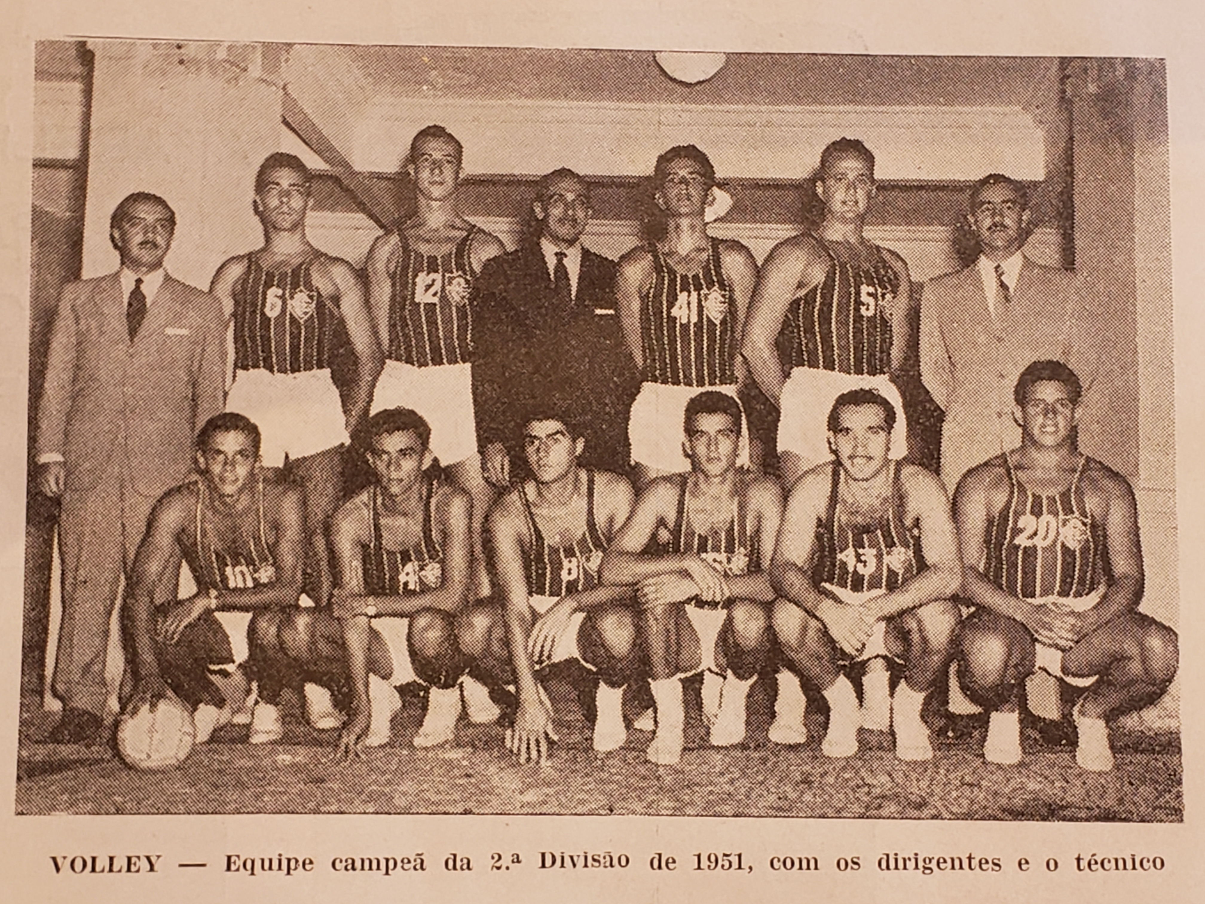 Fluminense campeão carioca de volei 2ª divisão 1951 conforme publicação da Revista do Fluminense.